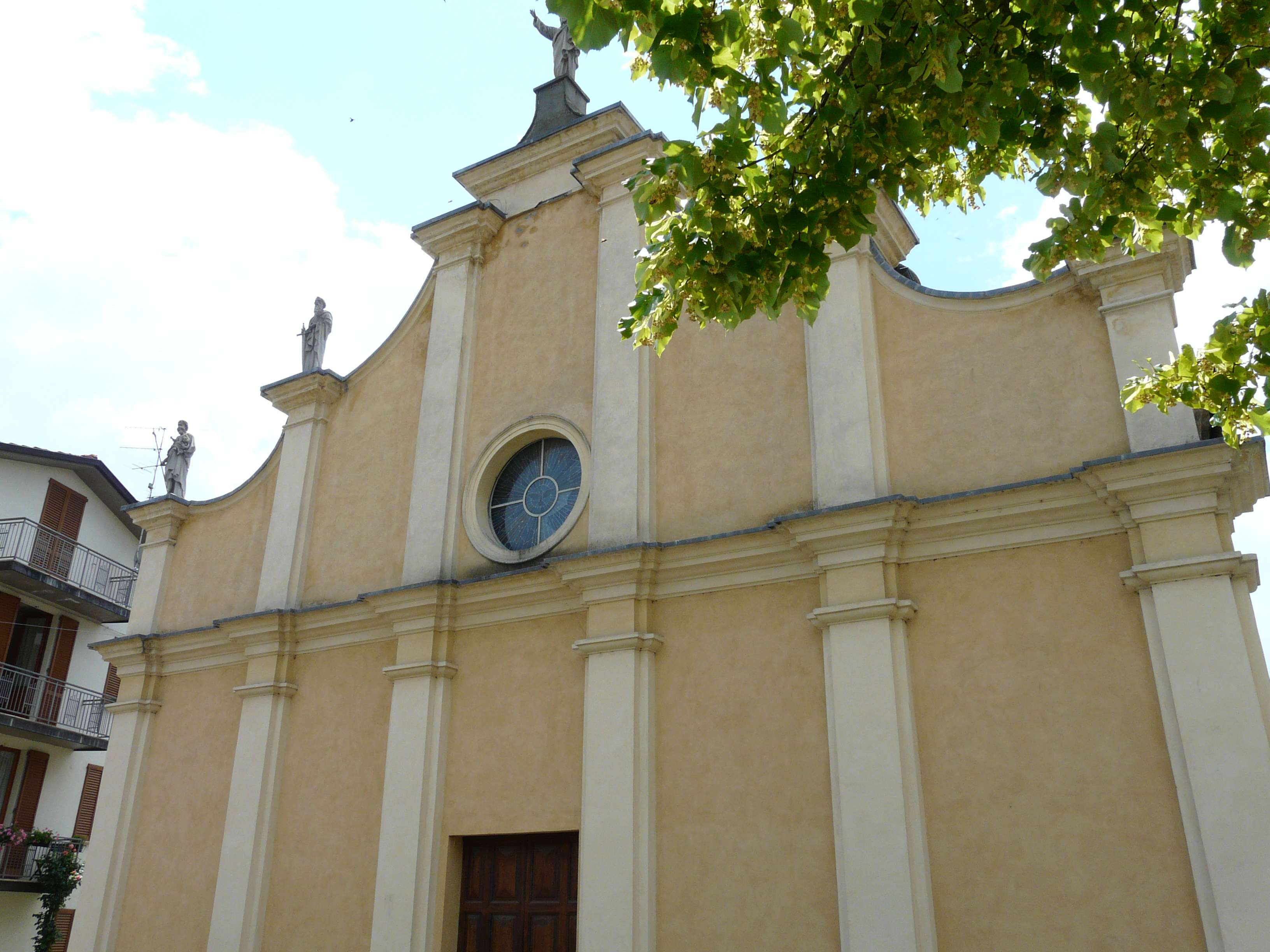 Chiesa di San Giovanni Battista di Bardi, Emilia-Romagna, Italia